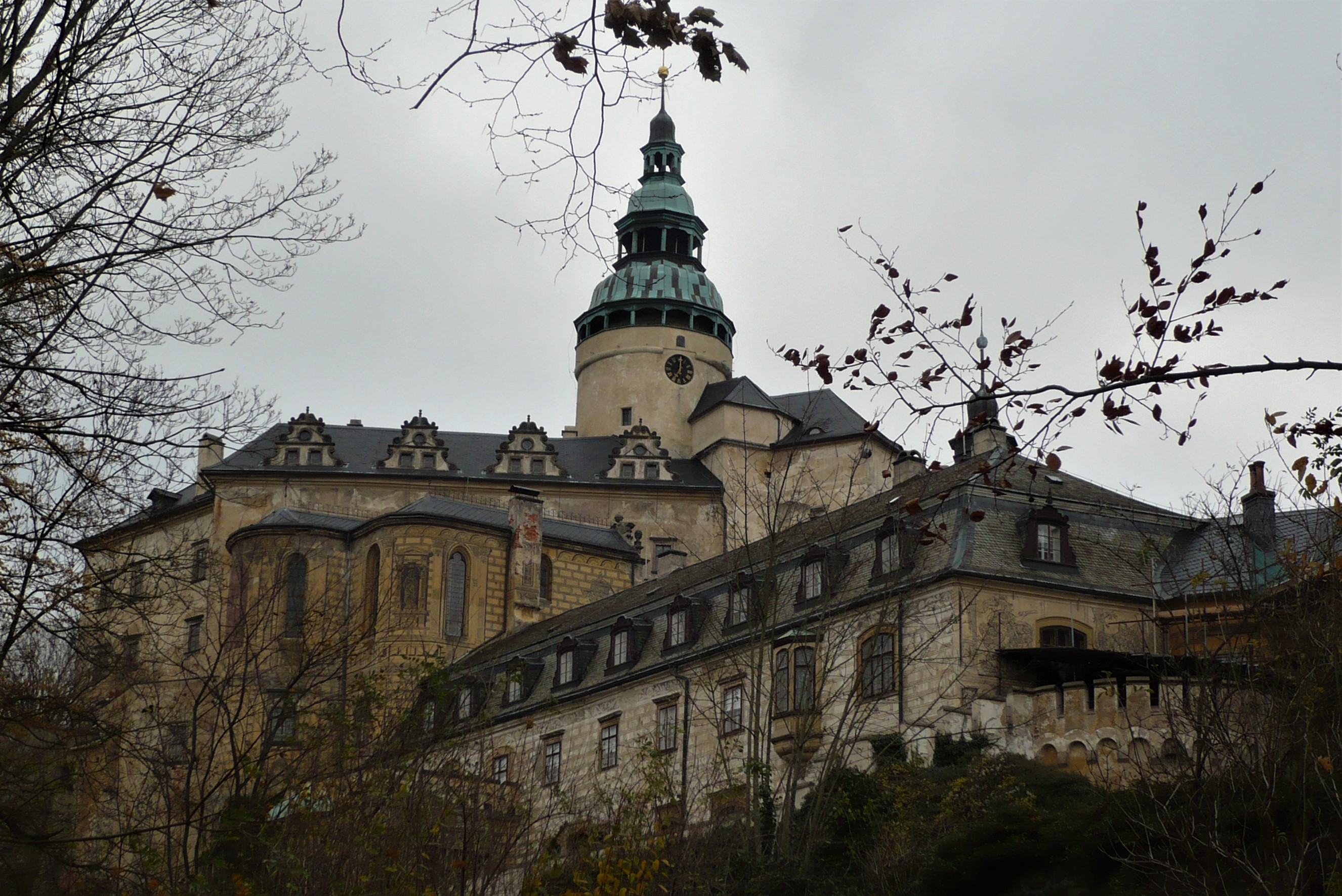 Frýdlant